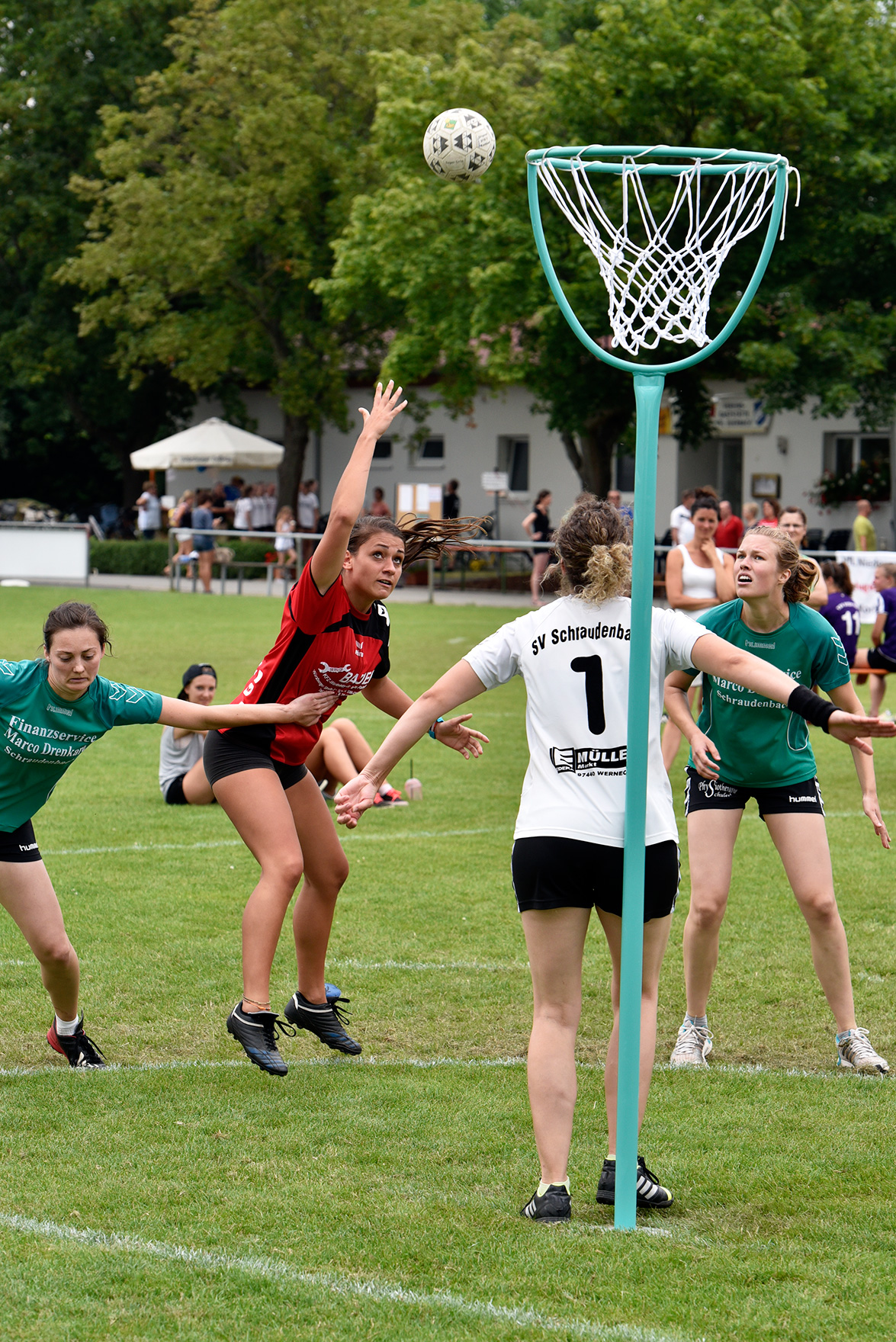 Sabrina Eckert (TSV Bergrheinfeld) nach dem Absetzen eines Korblegers im Spiel gegen den SV Schraudenbach bei den Bayerischen Meisterschaften im Feldkorbball 2016 in Euerbach.